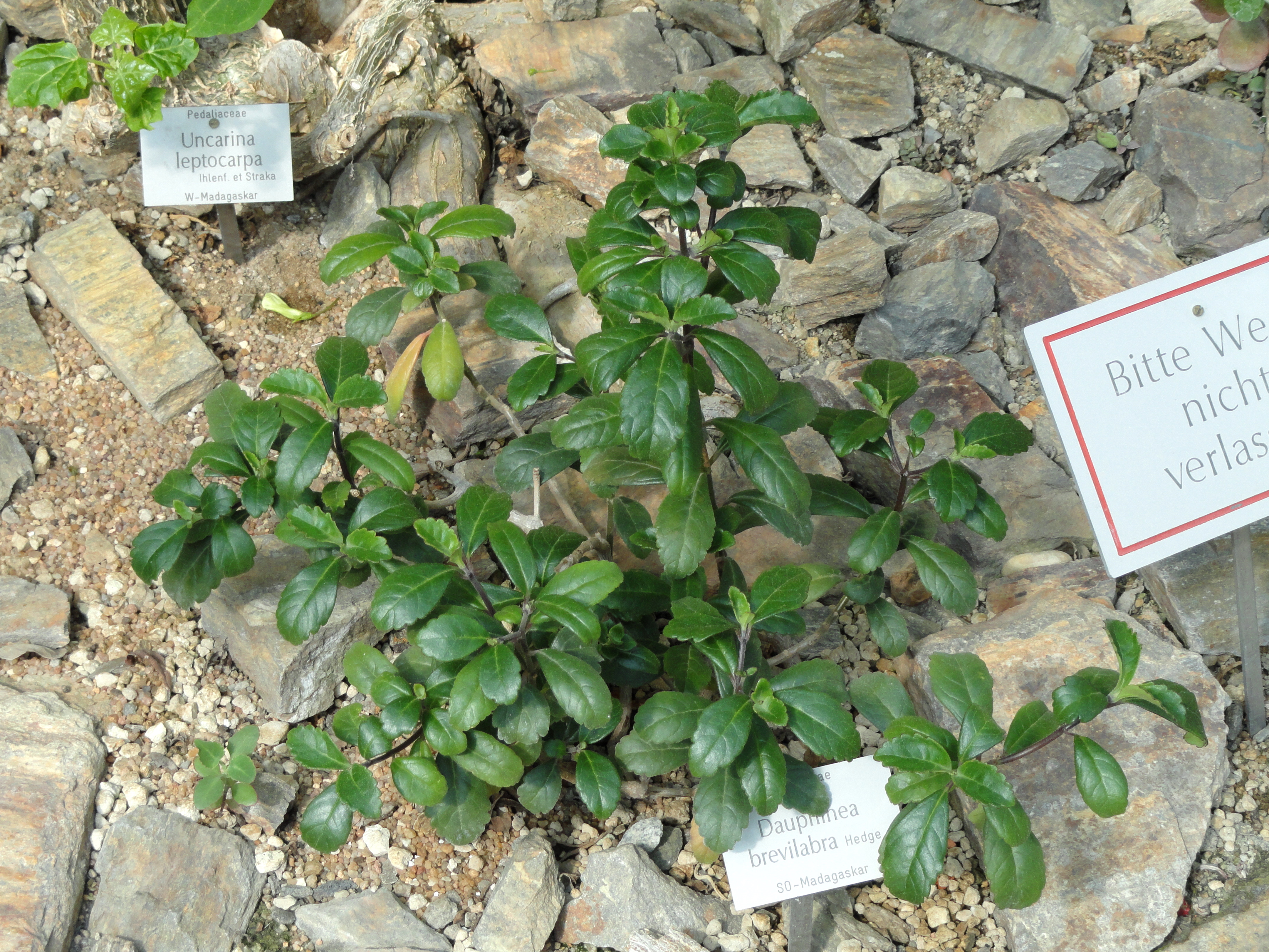 Dauphinea brevilabra specimen in the Botanischer Garten München-Nymphenburg, Munich, Germany.